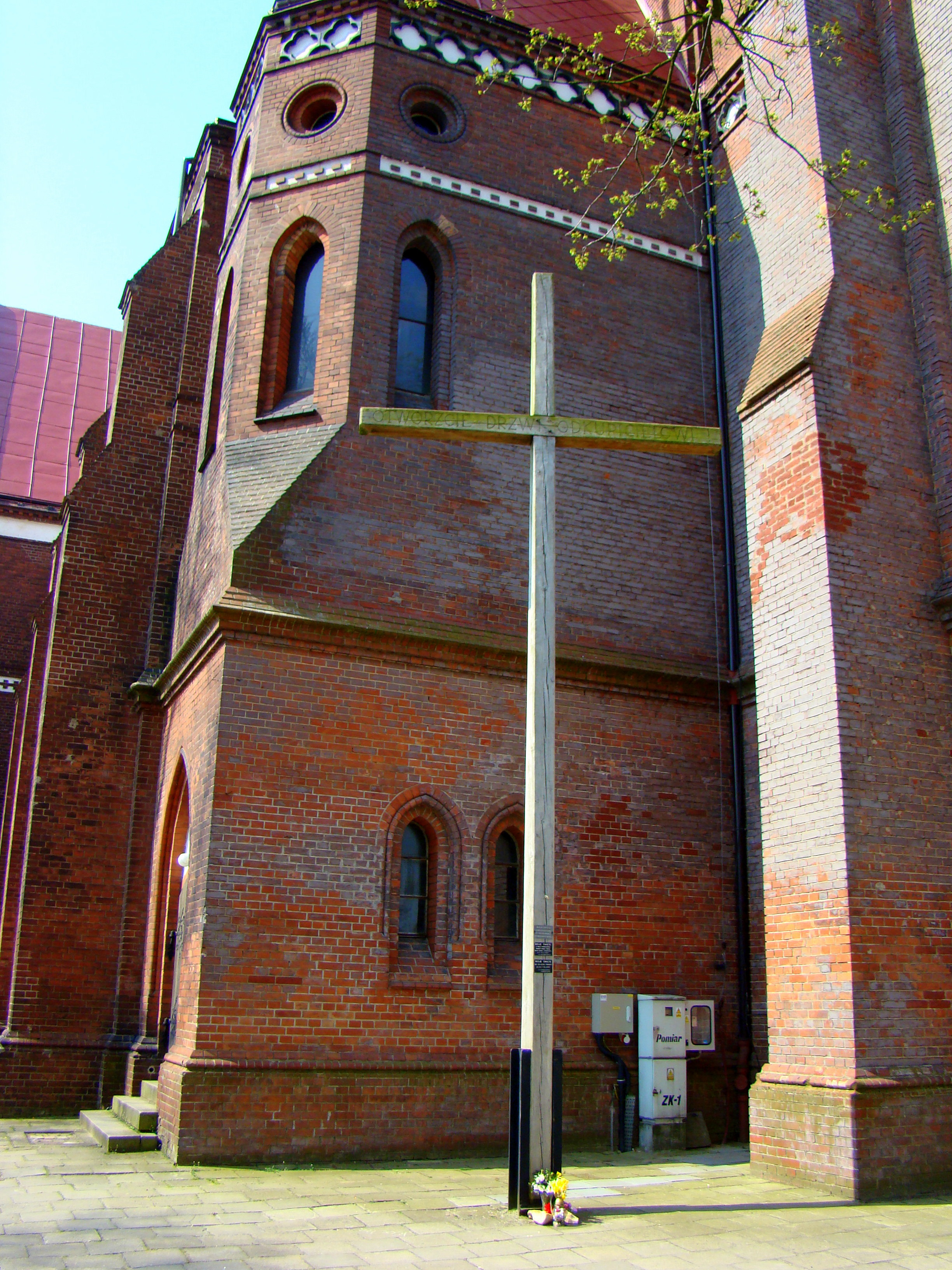 Kościół Niepokalanego Poczęcia NMP w Policach (krzyż przykościelny), Polska